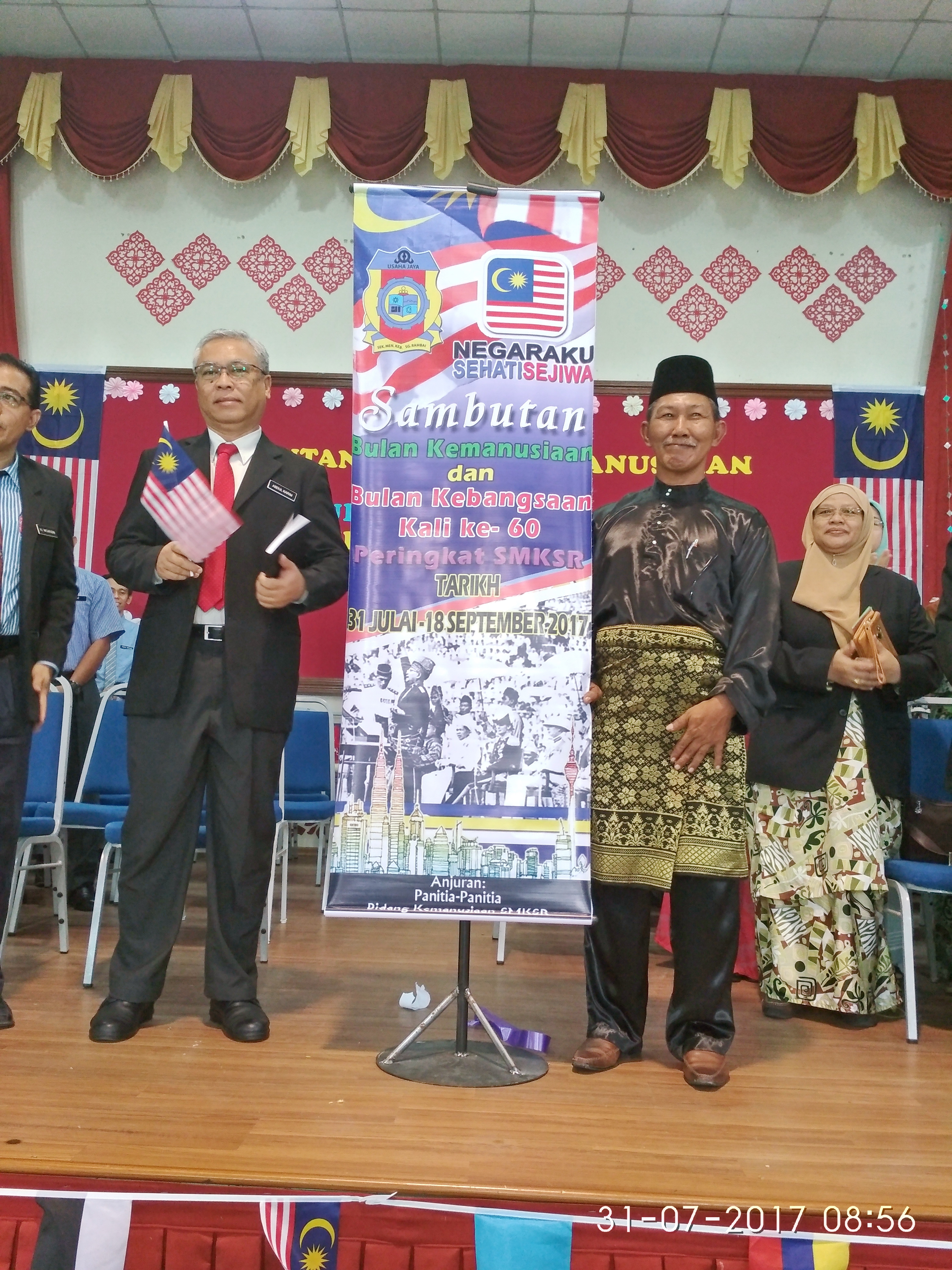 pengetua dan perasmi majlis hari tersebut